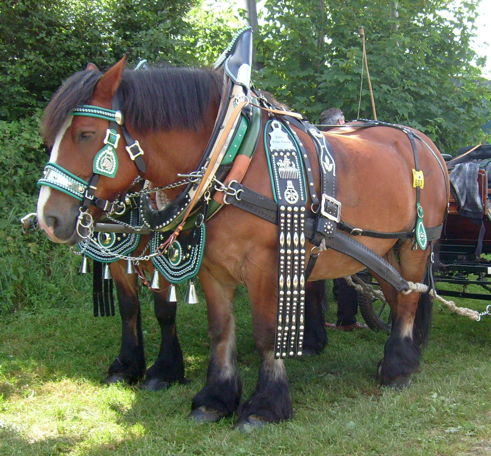 Rheinisch-Deutsches Kaltblut in Eicherscheid, Eifel, Doppelt angespannt